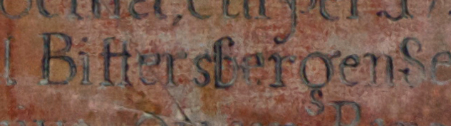 Nennung von Bittersbergen auf dem Epitaph des D. Johann Baptist Ostler vom Jahr 1779 in der Pfarrkirche von Pittersberg